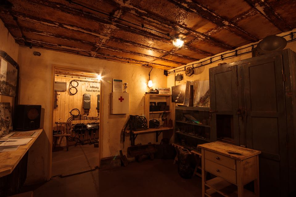 608 zicht op de planraum en nachrichtenraum